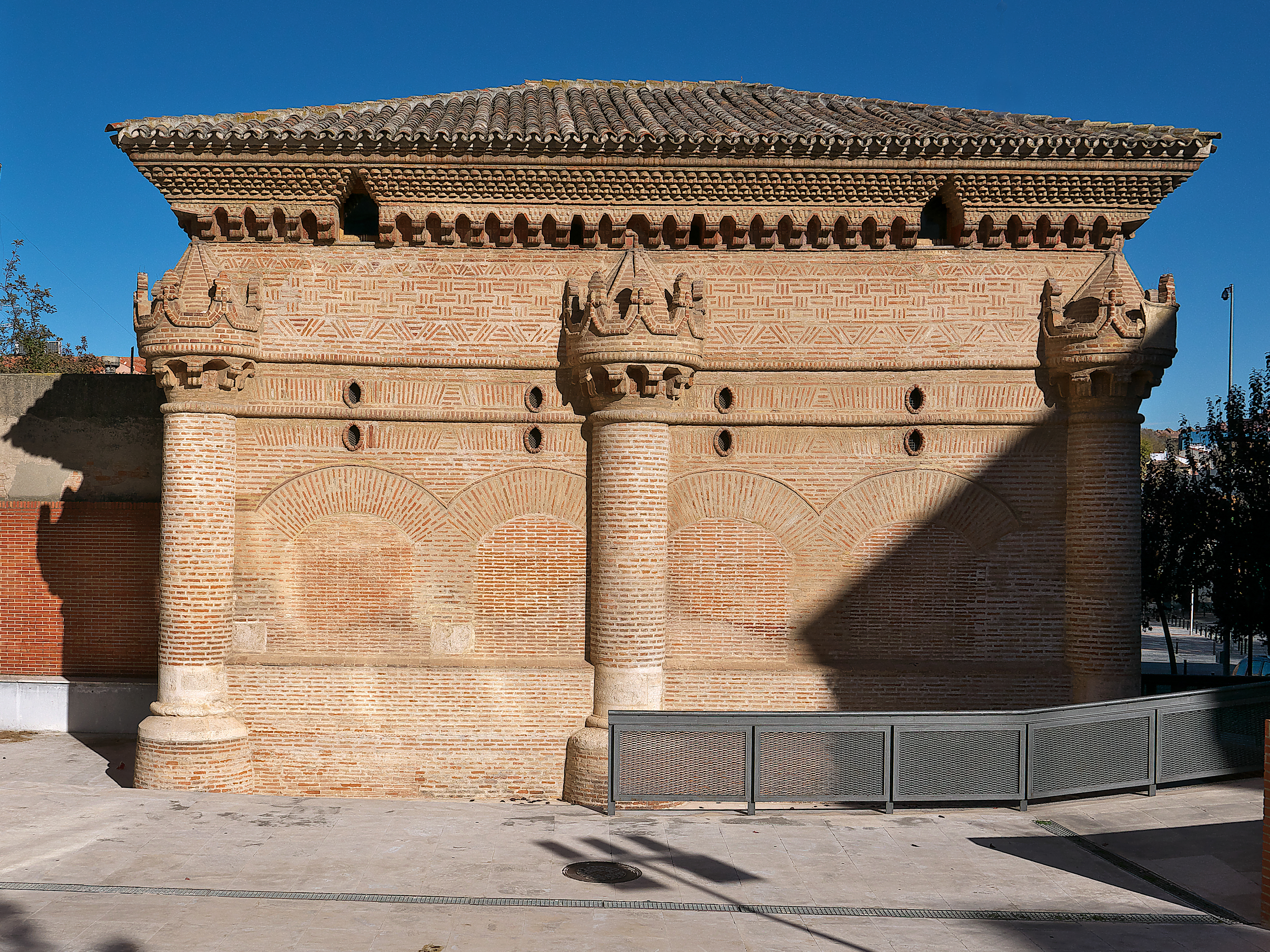 Capilla funeraria del humanista Luis de Lucena (1538-1540)